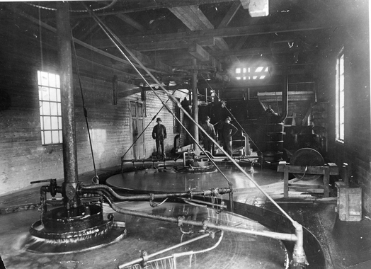 Interiør fra vaskeriet (flotasjon) i Fagerli. 1894 SG.F.10009-2101